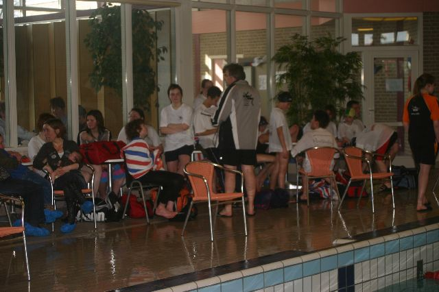 MOSA-regio tijdens de 5e (laatste) competitie wedstrijd in Helden.